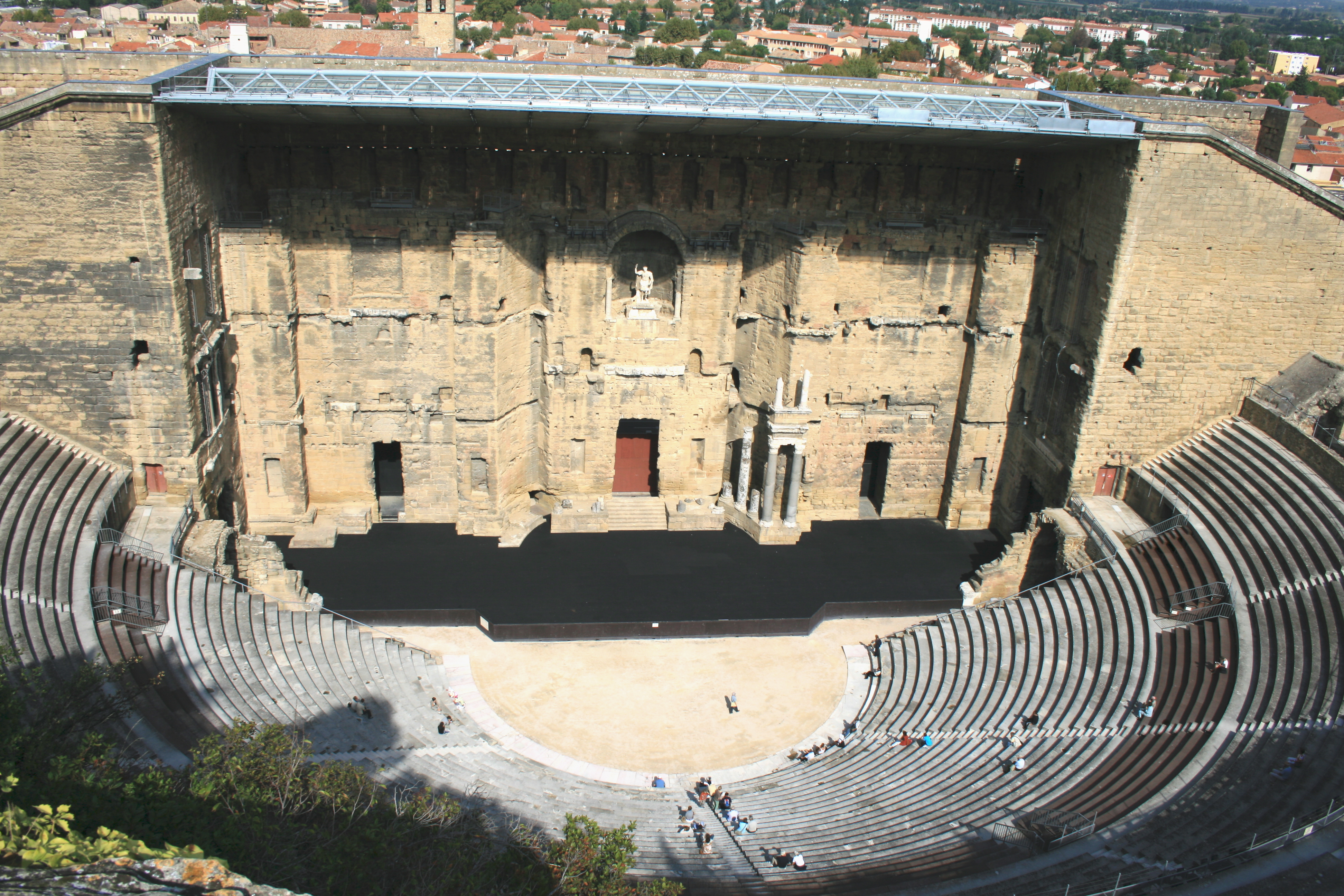 Le théâtre antique de la ville d'ORANGE (VAUCLUSE, FRANCE)